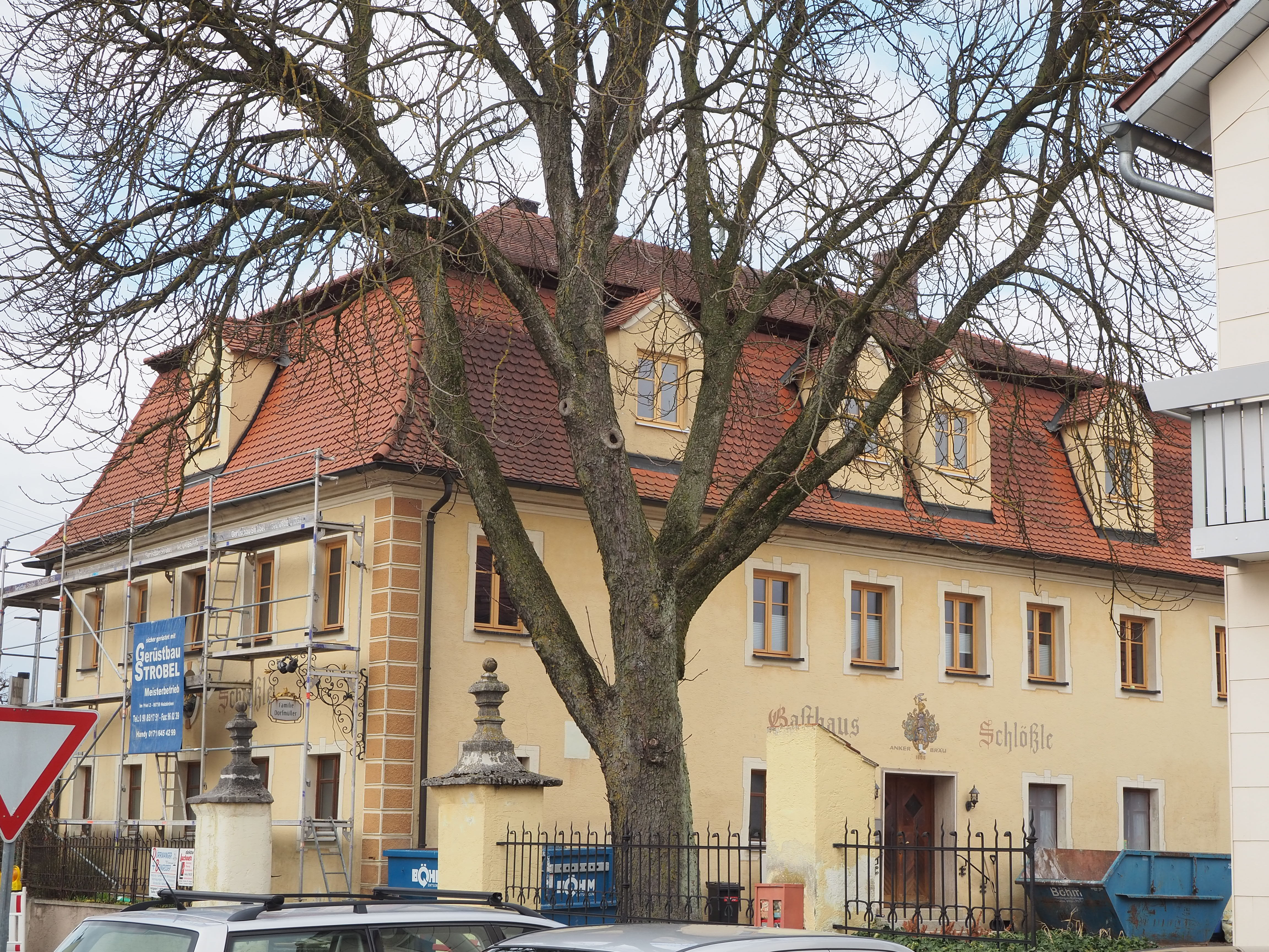 Fünfstetten, Marktplatz 1 Gasthof Schlößle BLfD D-7-79-148-3